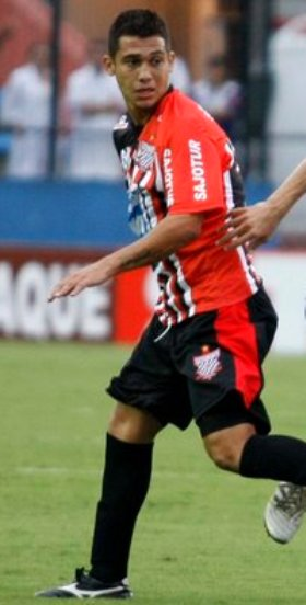 Diego Barboza em ação no Paulista de Jundiaí em 2010